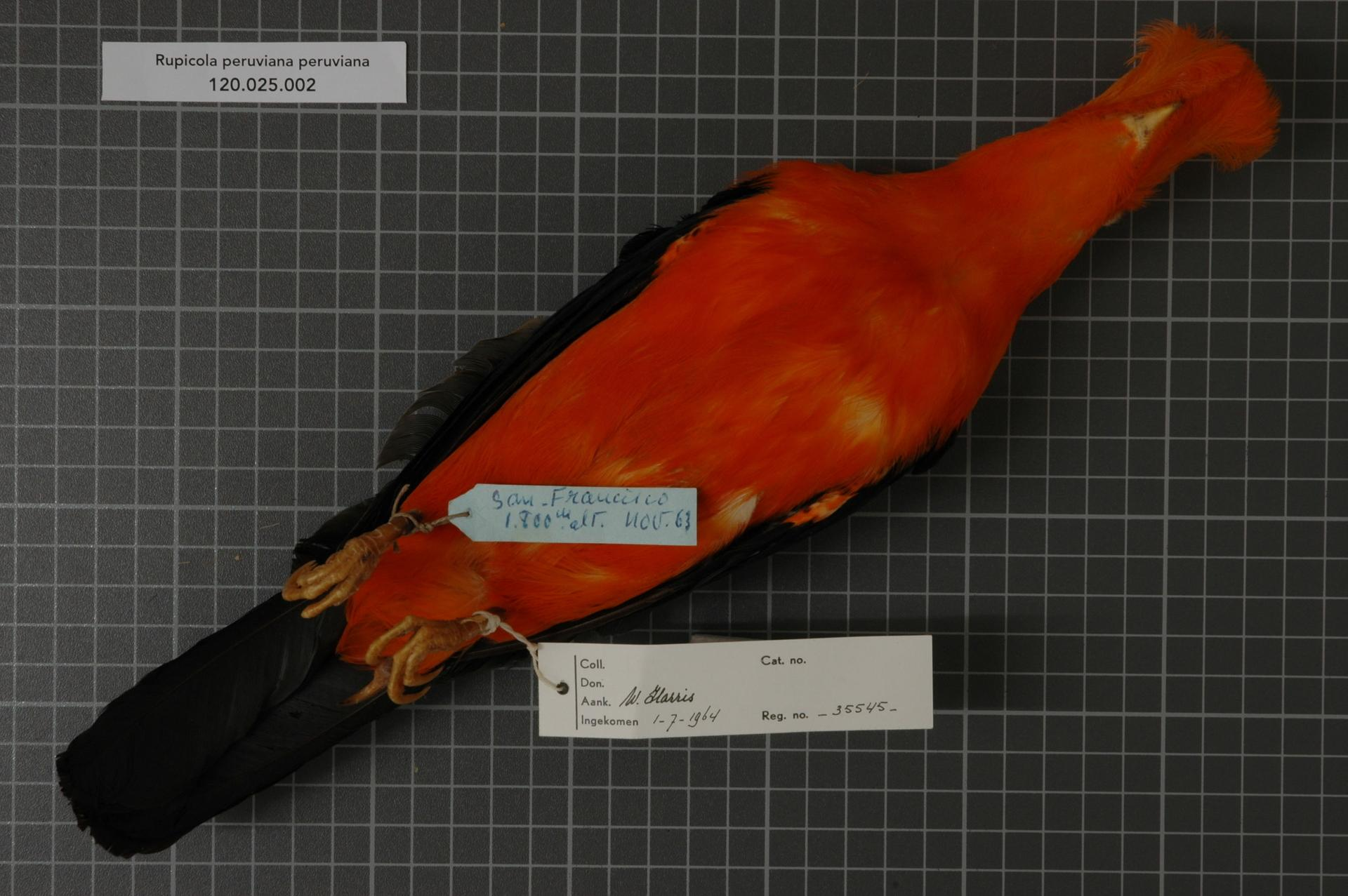 Rupicola peruviana peruviana (Latham, 1790)